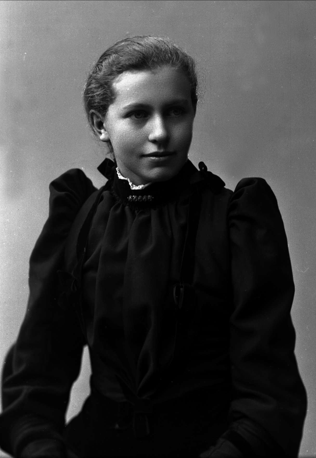 Kathrine Hofgaard (1875–1960), datter av skolebestyrer Simon Wright Hofgaard og hustru Ida Mathilde Aars, senere gift med høyesterettsadvokat og statsminister Otto Bahr Halvorsen.